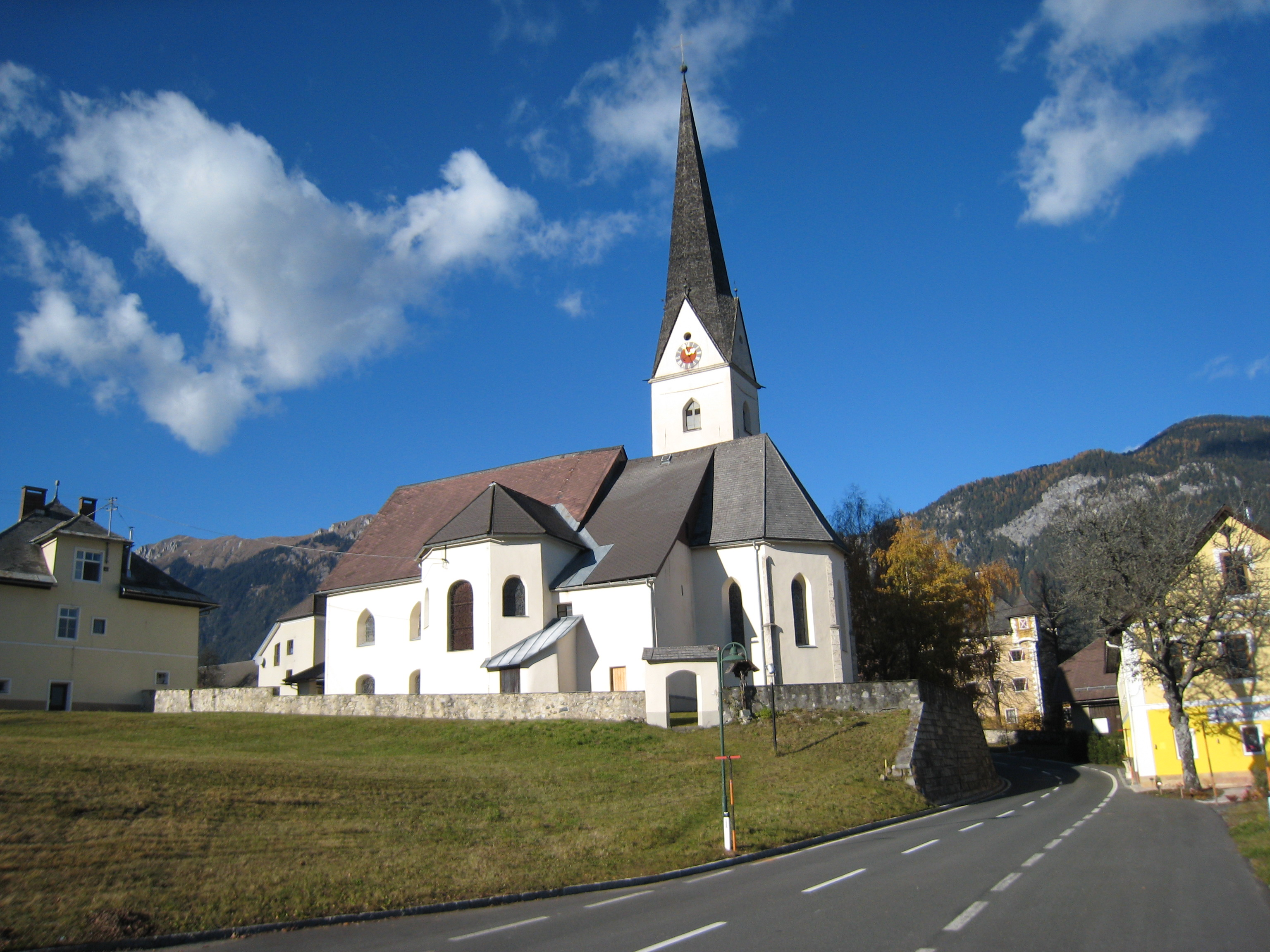 Pfarrkirche Sankt Stefan im Gailtal